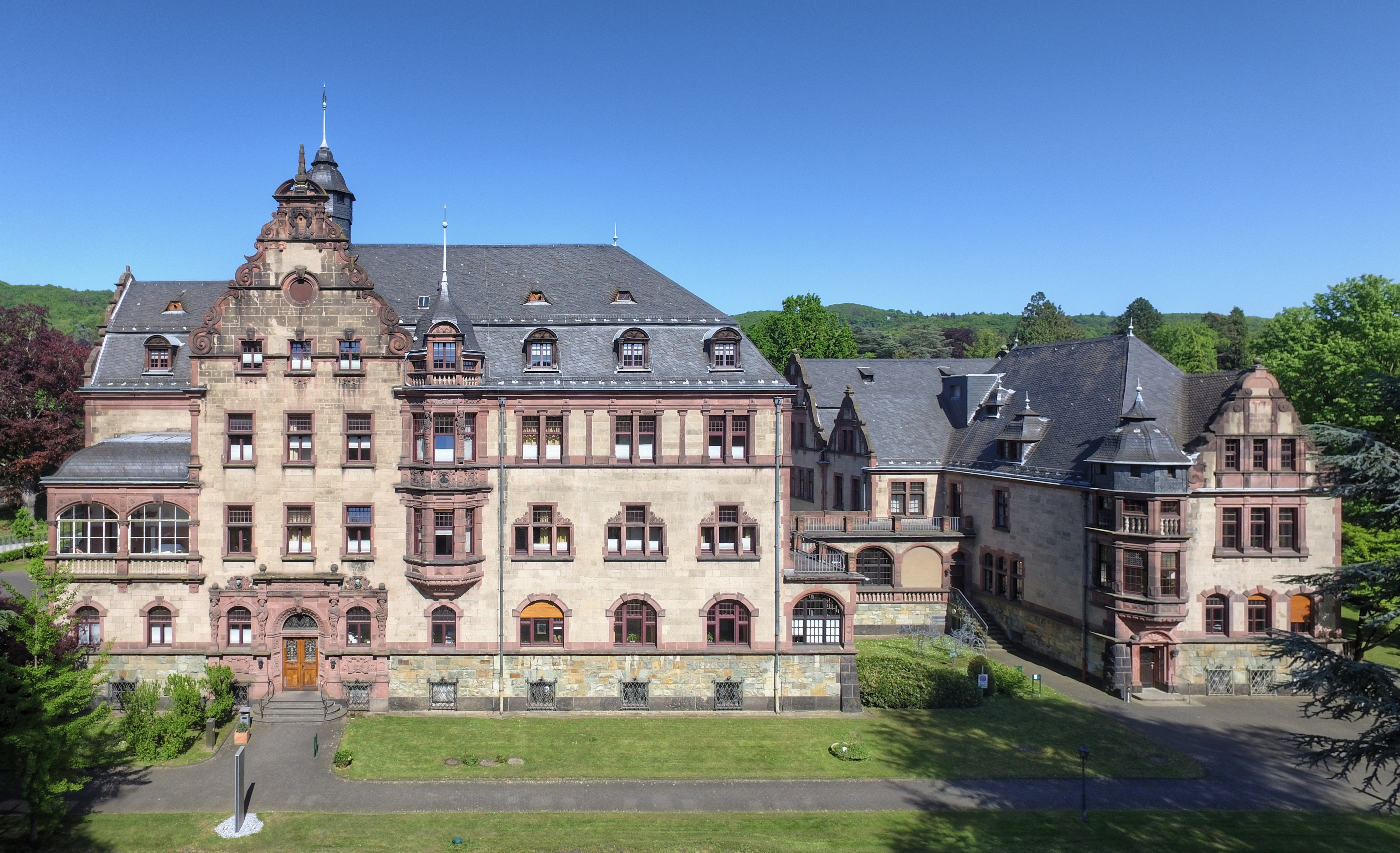 Hölterhoffstift am Physikzentrum Bad Honnef, Westseite